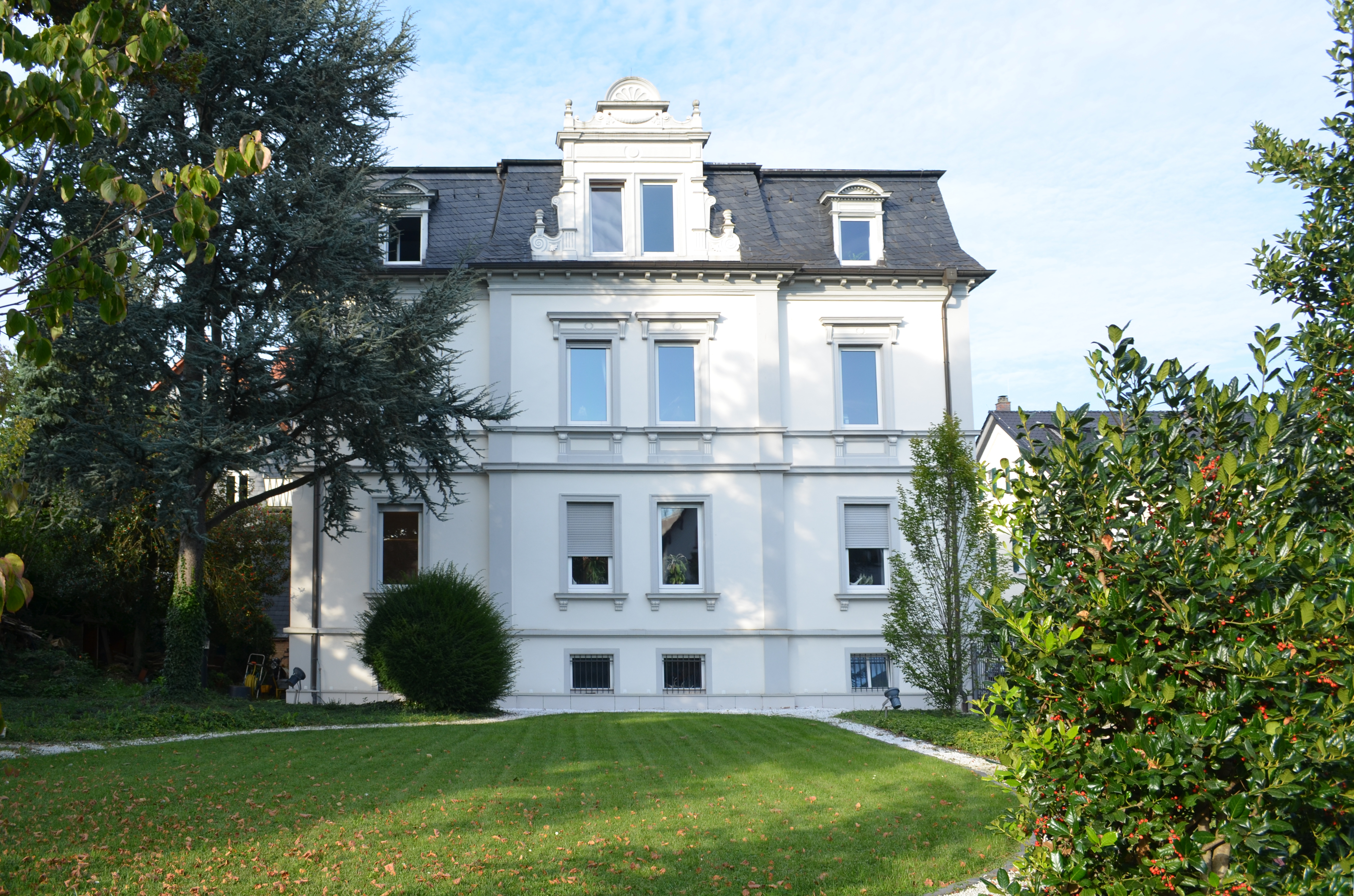 Friedrichsdorf, Wilhelmstraße 14